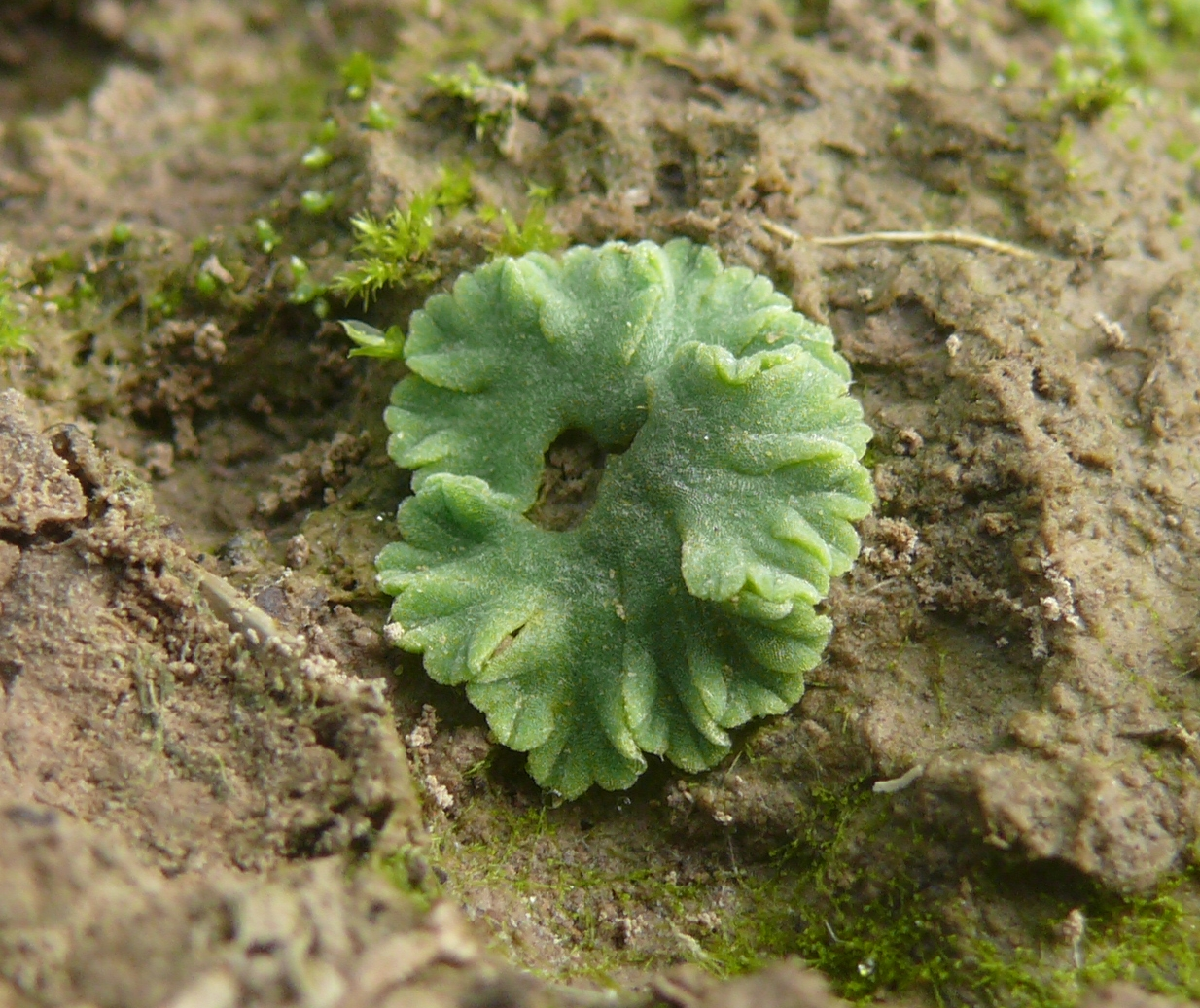 Riccia glauca, Hohenloher Ebene, Deutschland